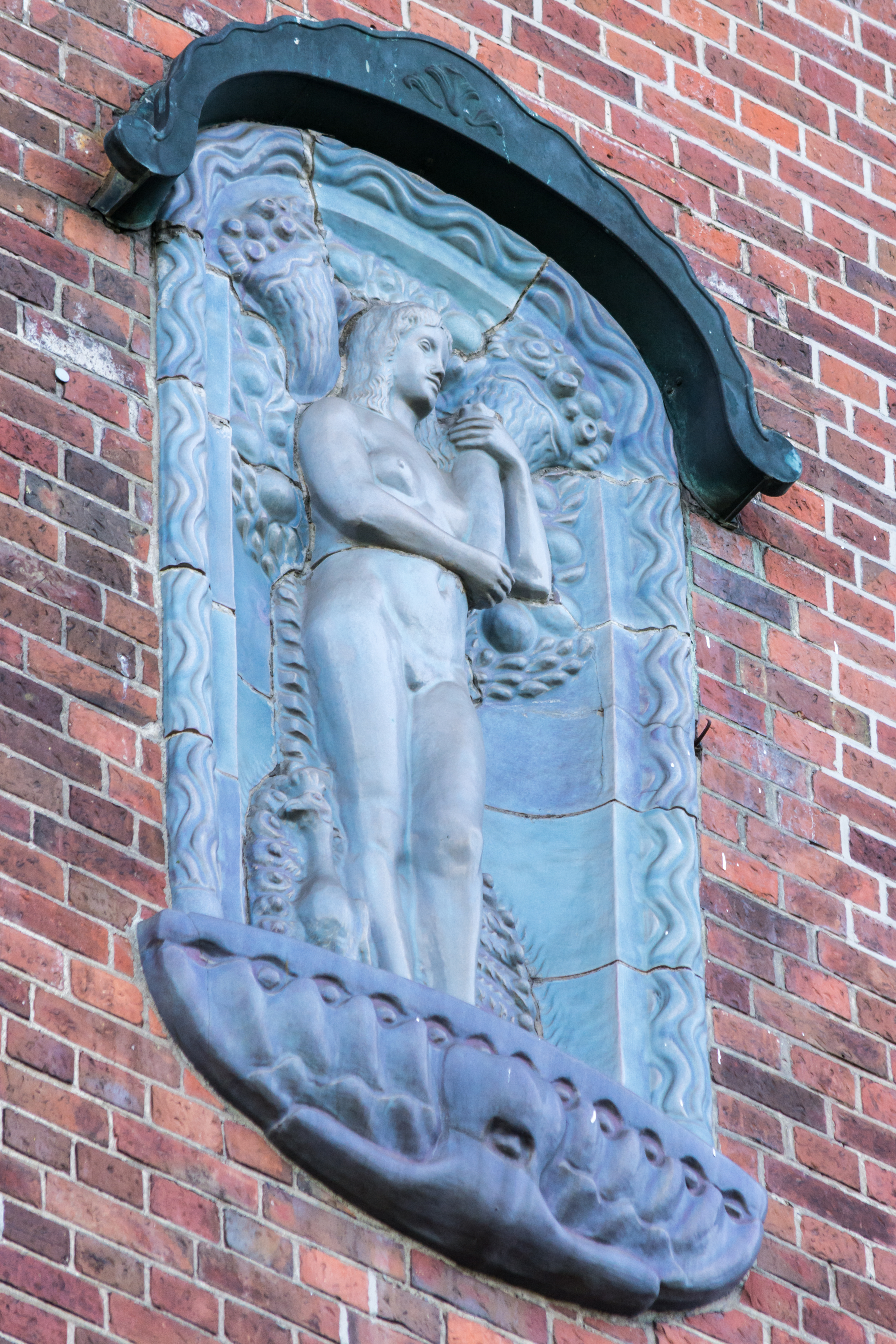 Hochschule für Bildende Künste in Hamburg-Uhlenhorst: Keramik Fortuna von Johann Michael Bossard am dritten Geschoss des Kanalfügels. This is a photograph of an architectural monument.